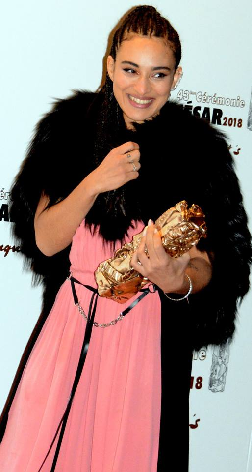 Camelia Jordana à la cérémonie des César du cinéma